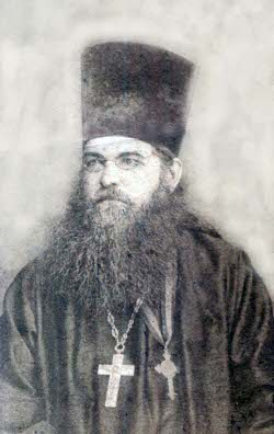 Первушин Иван Михеевич - деятель Русской православной церкви, педагог, математик